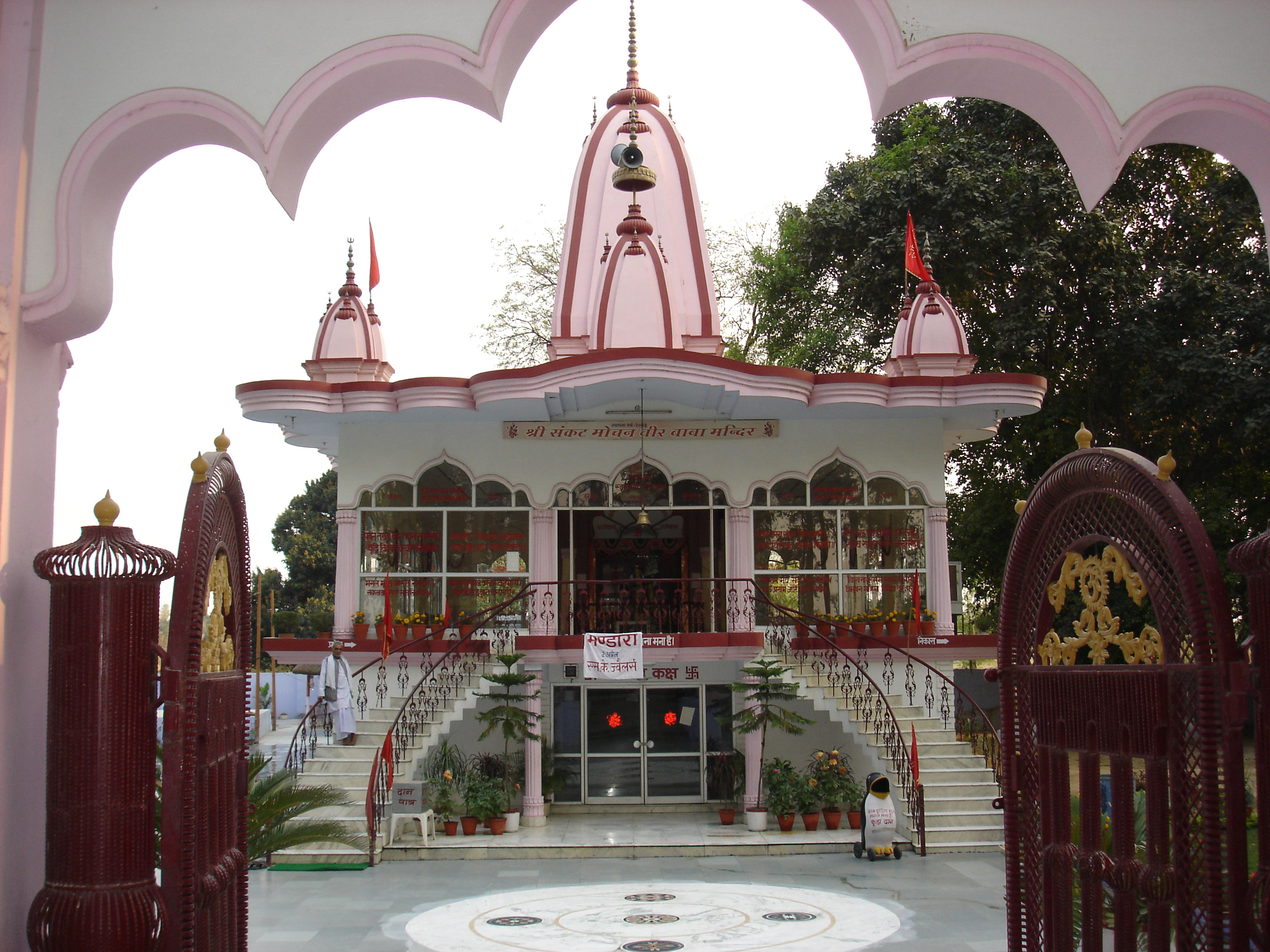 Shri Sankat Mochan Temple on Lakhimpur baharaich road